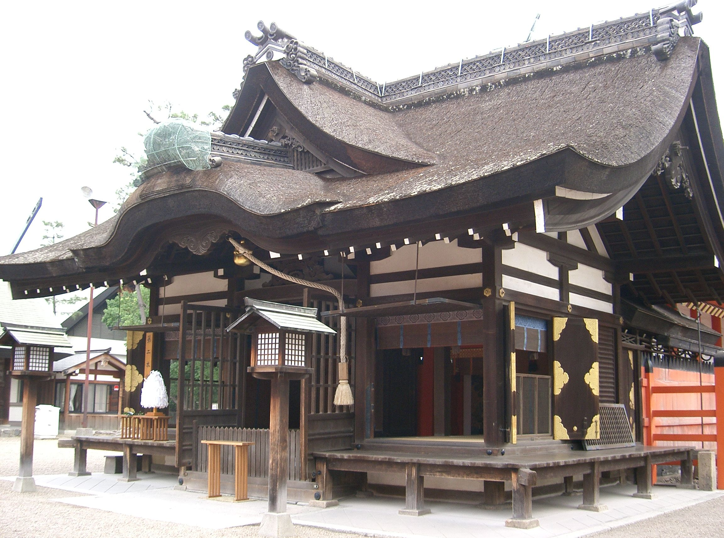 住吉大社 第二本宮